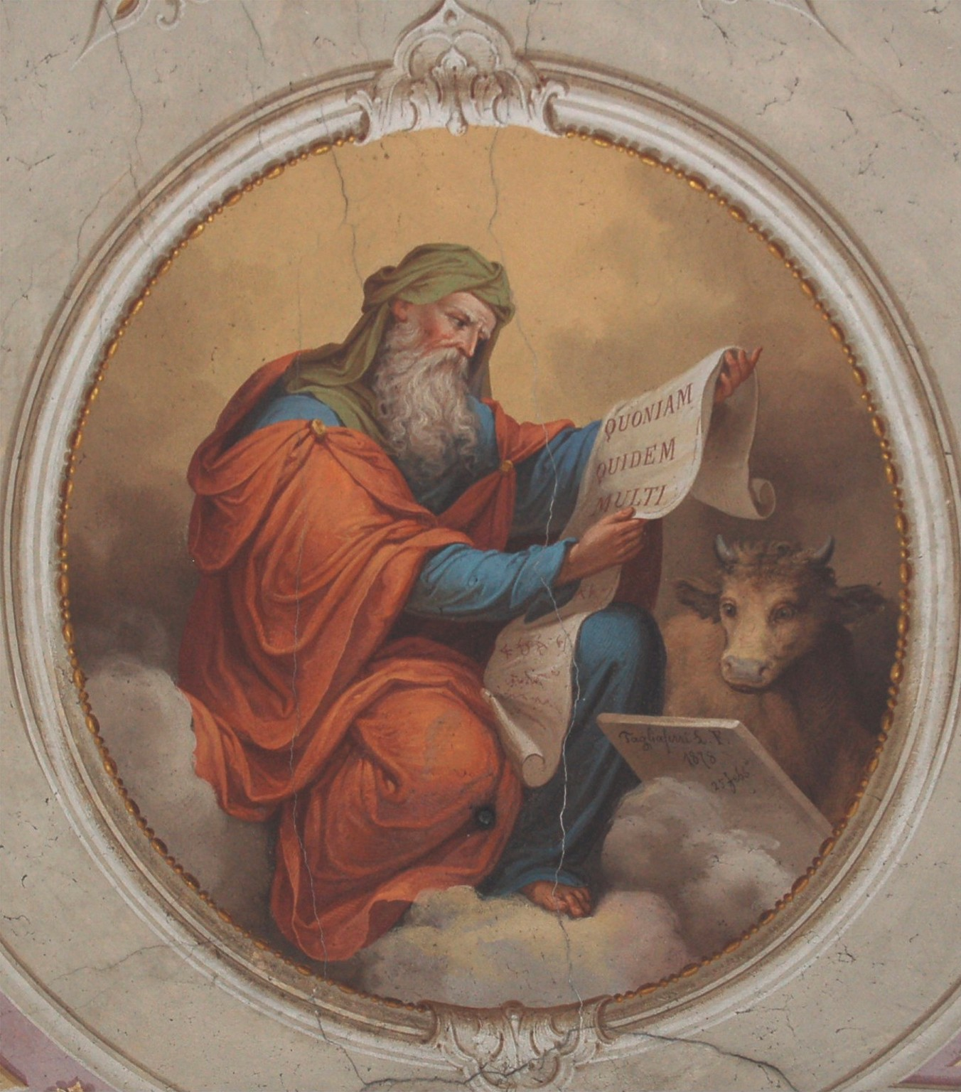 Affresco di Luigi Tagliaferri - Chiesa di San Pietro Martire in Baruffini Comune di Tirano - Sondrio